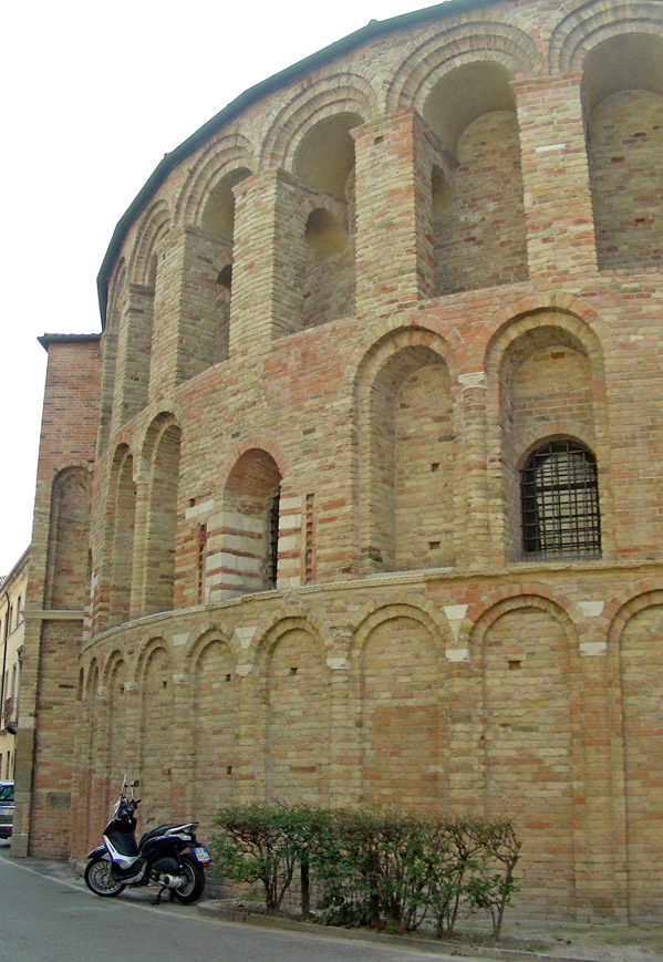 Italia, Veneto, Padova, chiesa di Santa Sofia, abside (particolare)